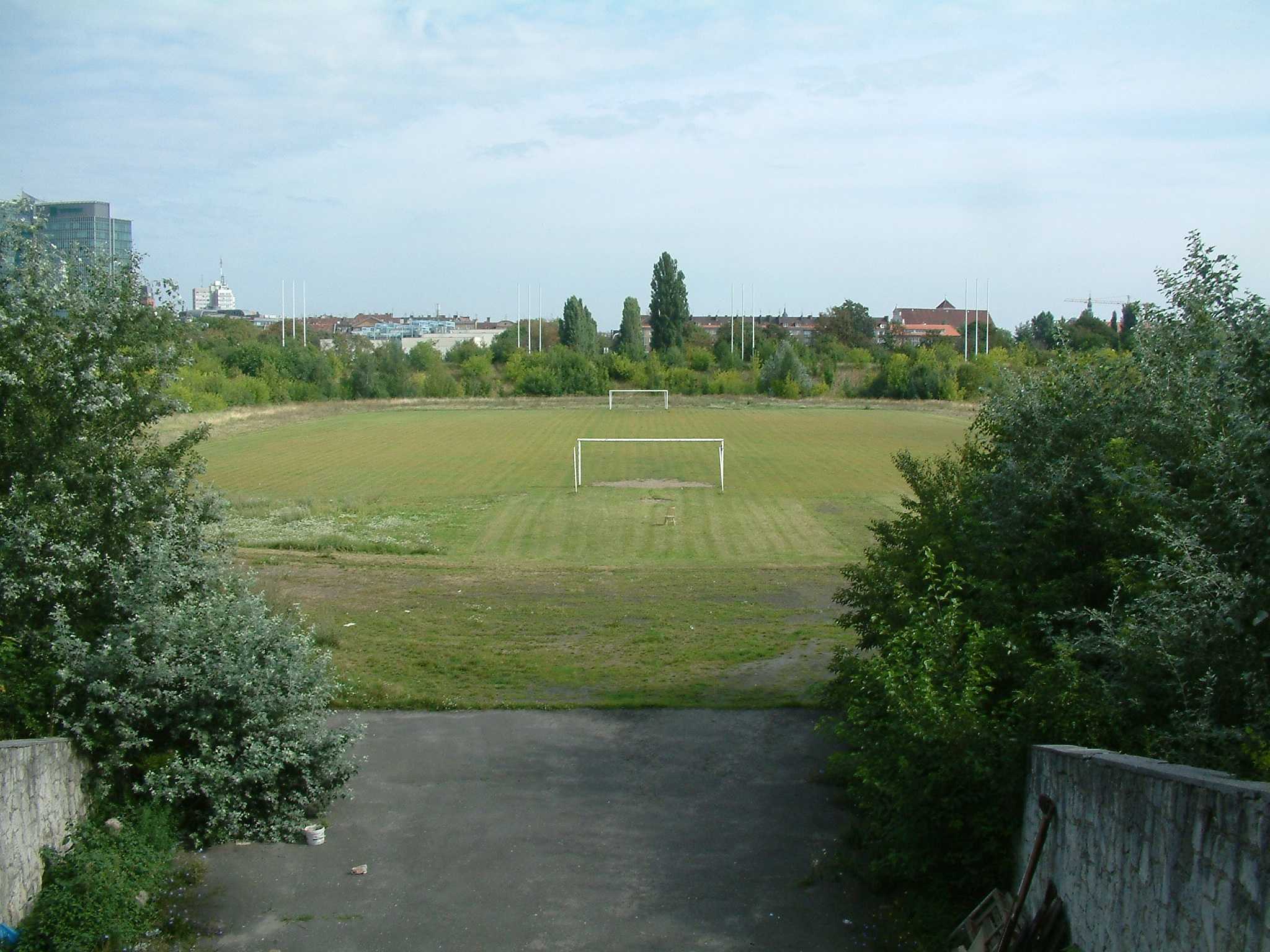 Edward Szyc Stadium in Poznań